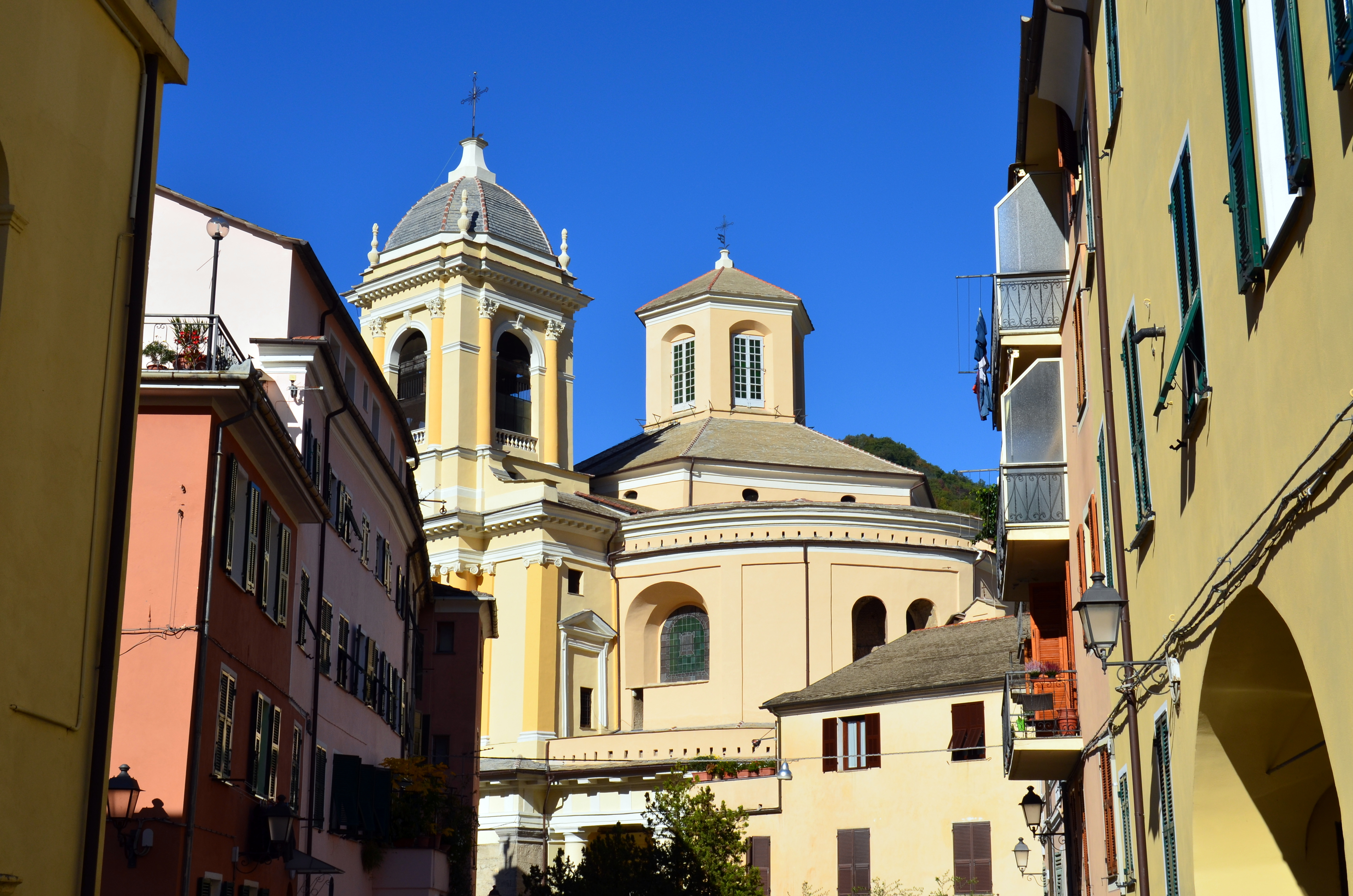 La collegiata di San Giovanni Battista, Pieve di Teco, Liguria, Italia